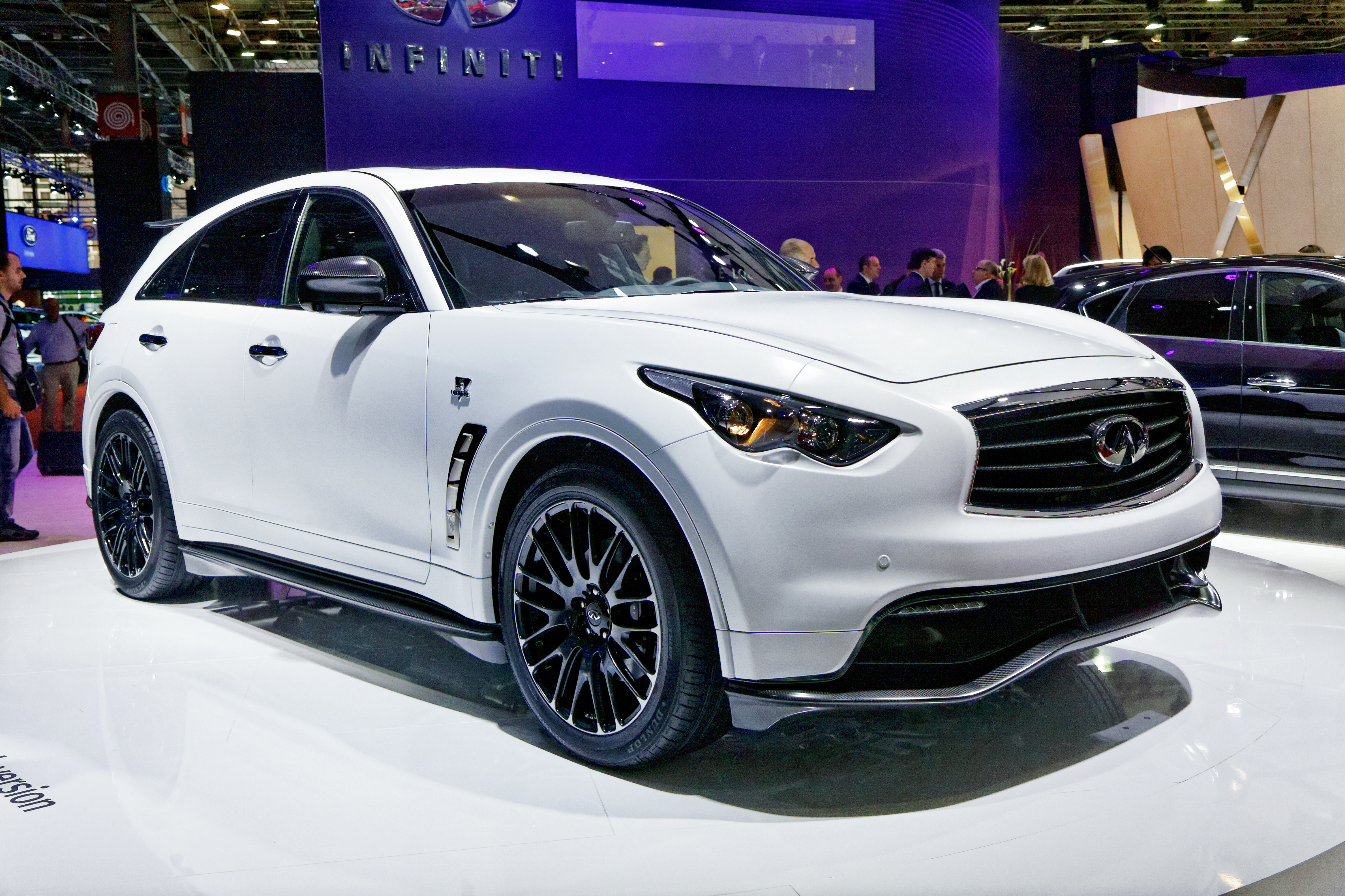 L'Infiniti FX Sebastian Vettel Version présentée lors du Mondial de l'Automobile de Paris 2012.